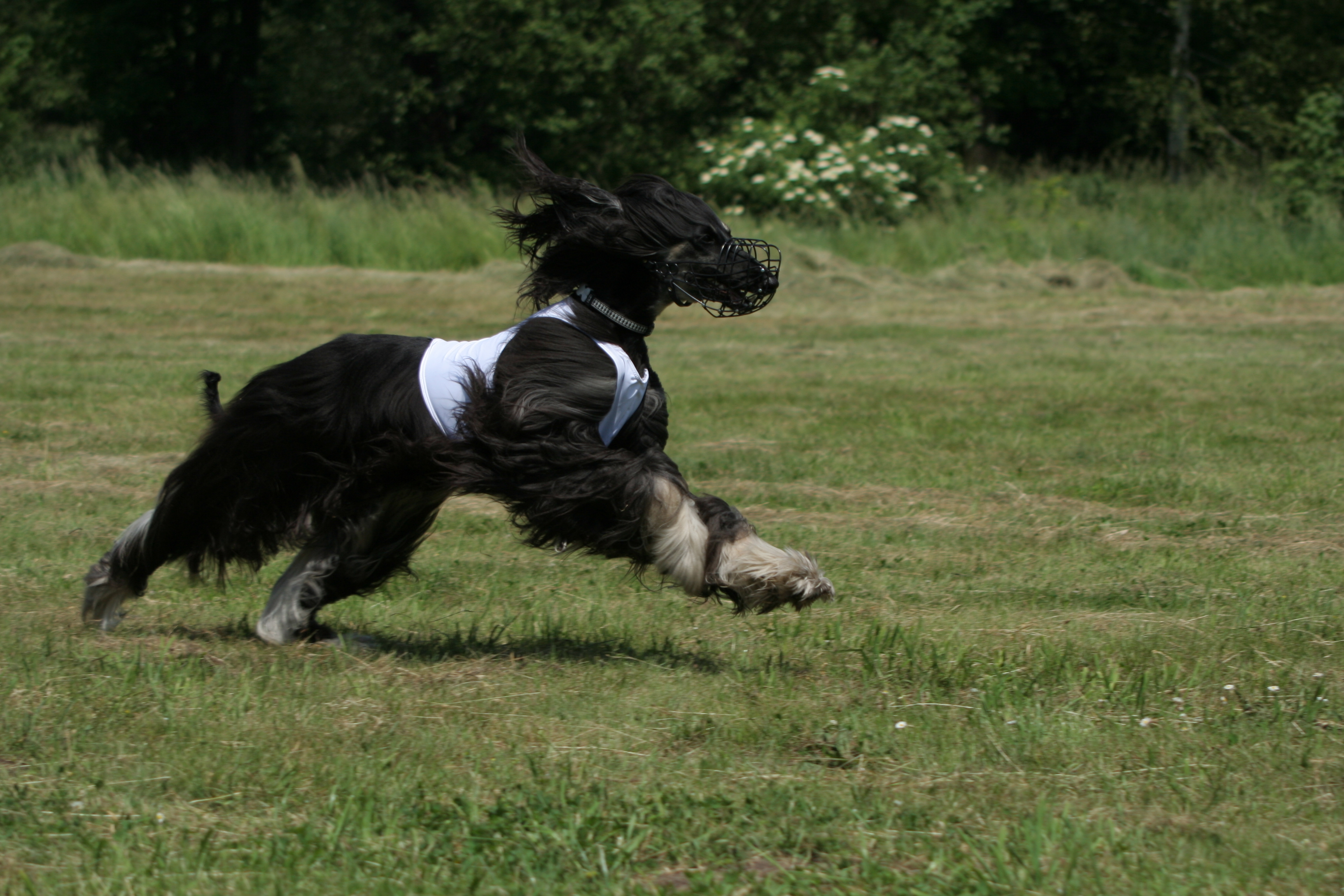 Wyścigi chartów w Świerklańcu, województwo śląskie.